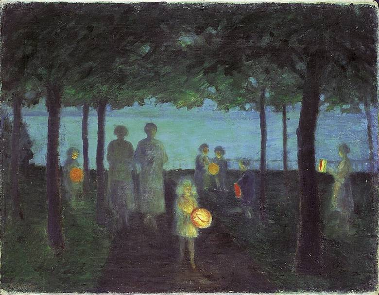 Ernst Oppler: Abend an der Ostsee Öl auf Leinwand. 50 x 65 cm.